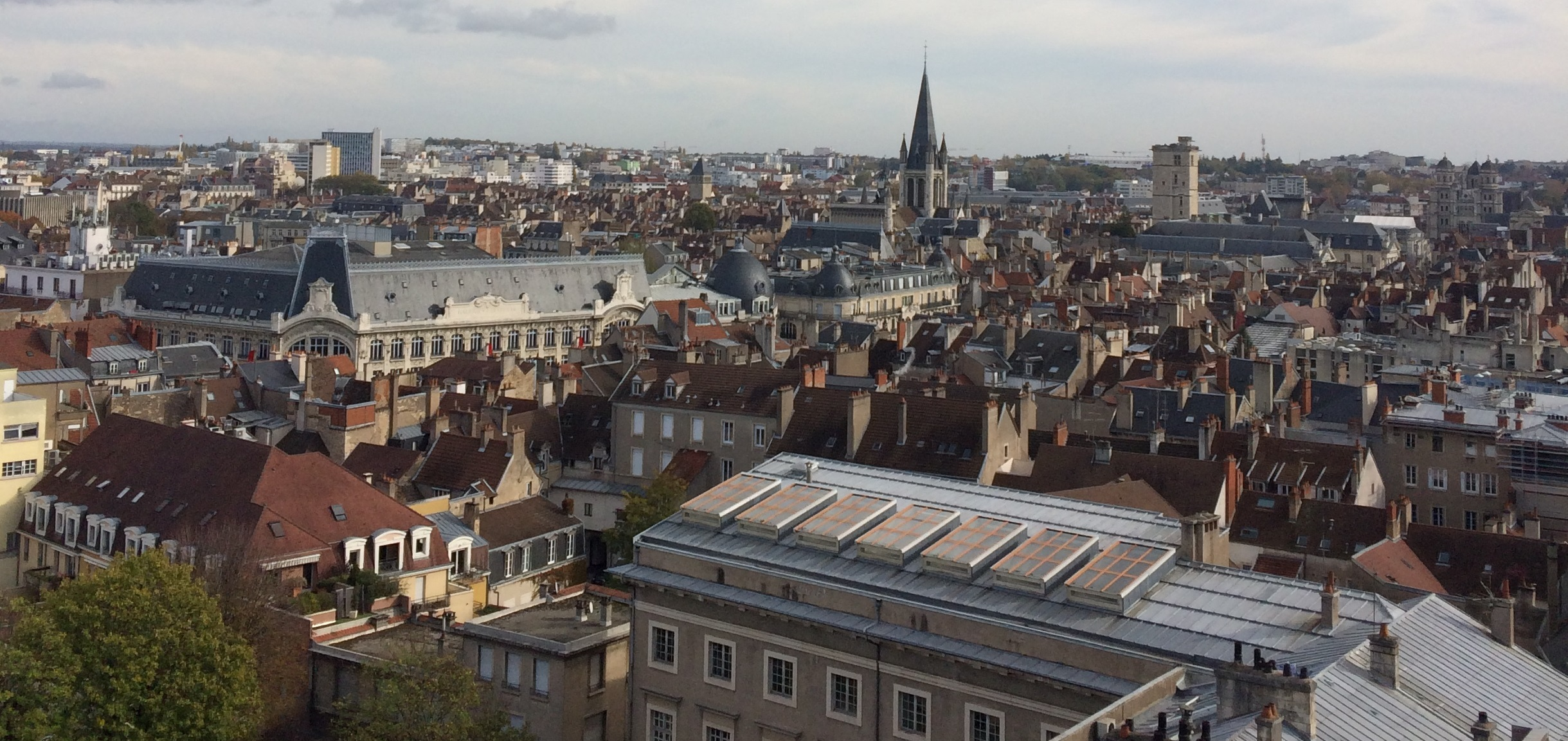 Vue des toits dijonnais depuis la cathédrale Saint-Bénigne avec le Palais des Etats de Bourgogne, les église Notre -Dame et Saint-Michel, la tour Saint-Nicolas, l'ancien palais abbatial Saint-Bénigne (ENSA), Les galeries Lafayette, les anciens grands magasins au Pauvre Diable et la Ménagère.